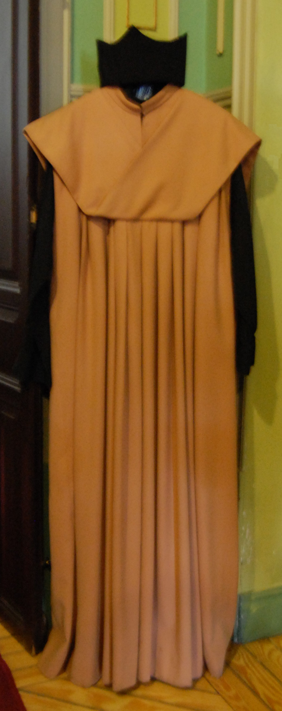 Indumentaria de los miembros del Colegio Mayor de San Ildefonso de la Universidad de Alcalá. Los colegiales vestían con un bonete negro, un manto de color canela y una beca del mismo color con "rosca" (un tipo de adorno). Ropaje donado por Francisca García Manzano al Museo Cisneriano.